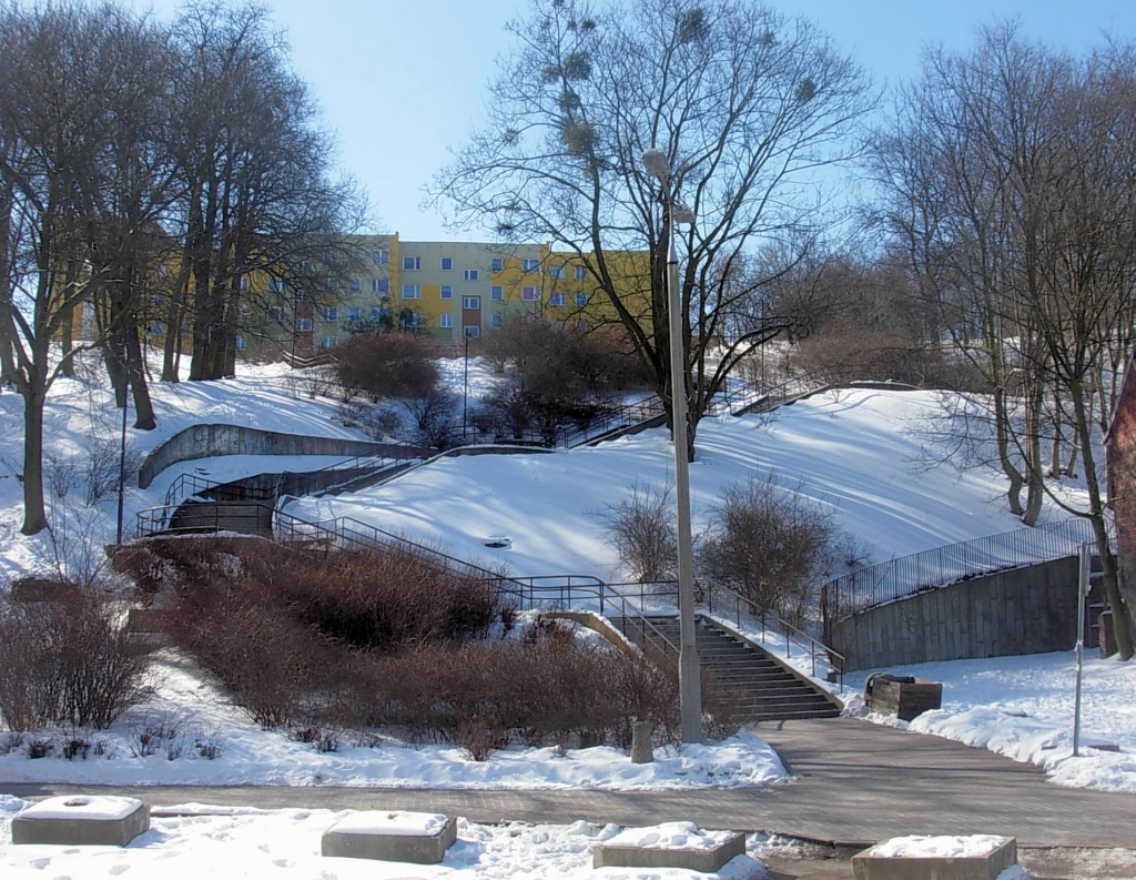 Skarpa Południowa w Bydgoszczy na osielu Szwederowo